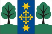 Úhlejov (okres Jičín)